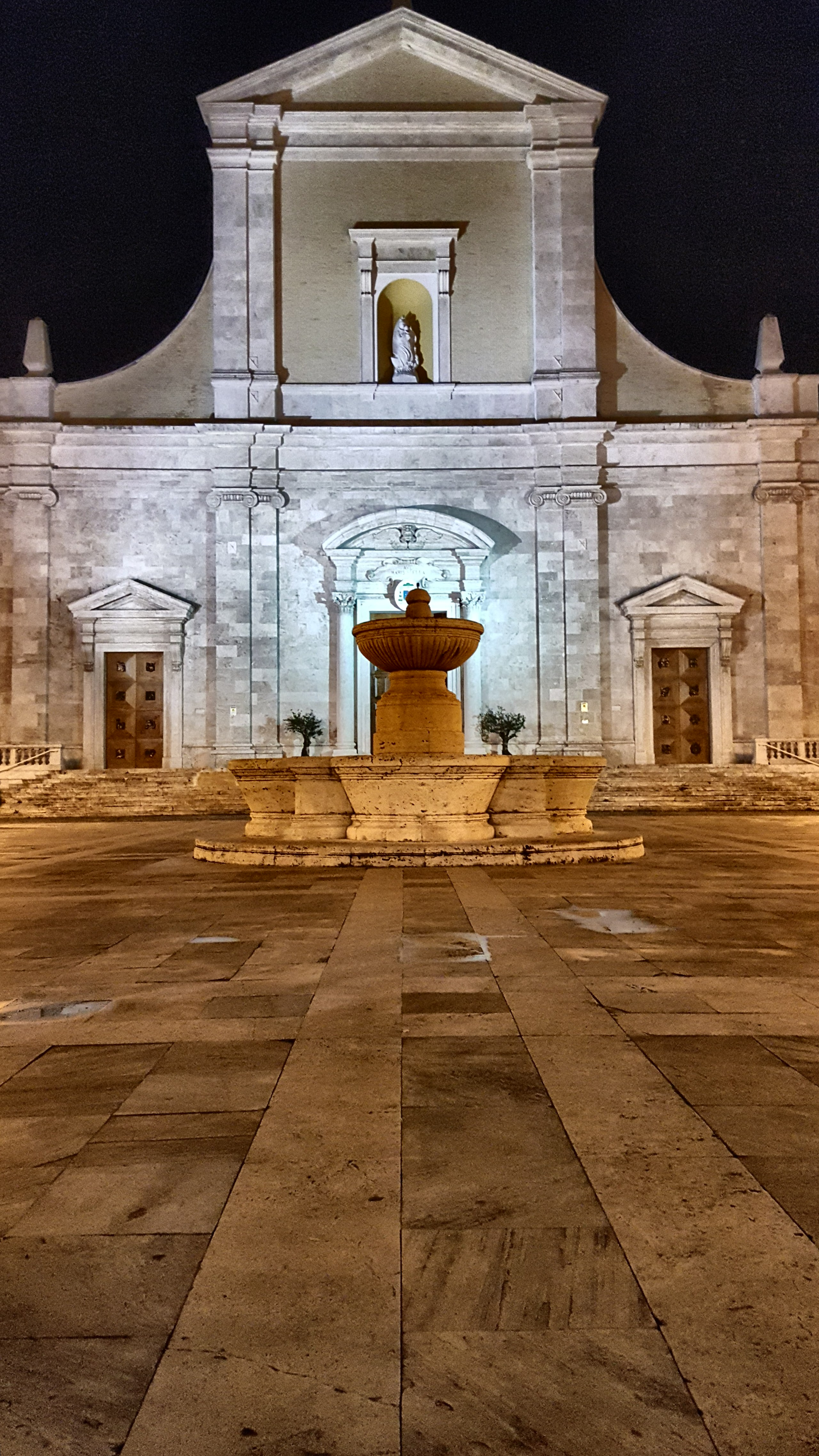 La chiesa di Santa Maria della Marina è il duomo di San Benedetto del Tronto, dal 1983 è cattedrale della Diocesi di San Benedetto del Tronto-Ripatransone-Montalto.